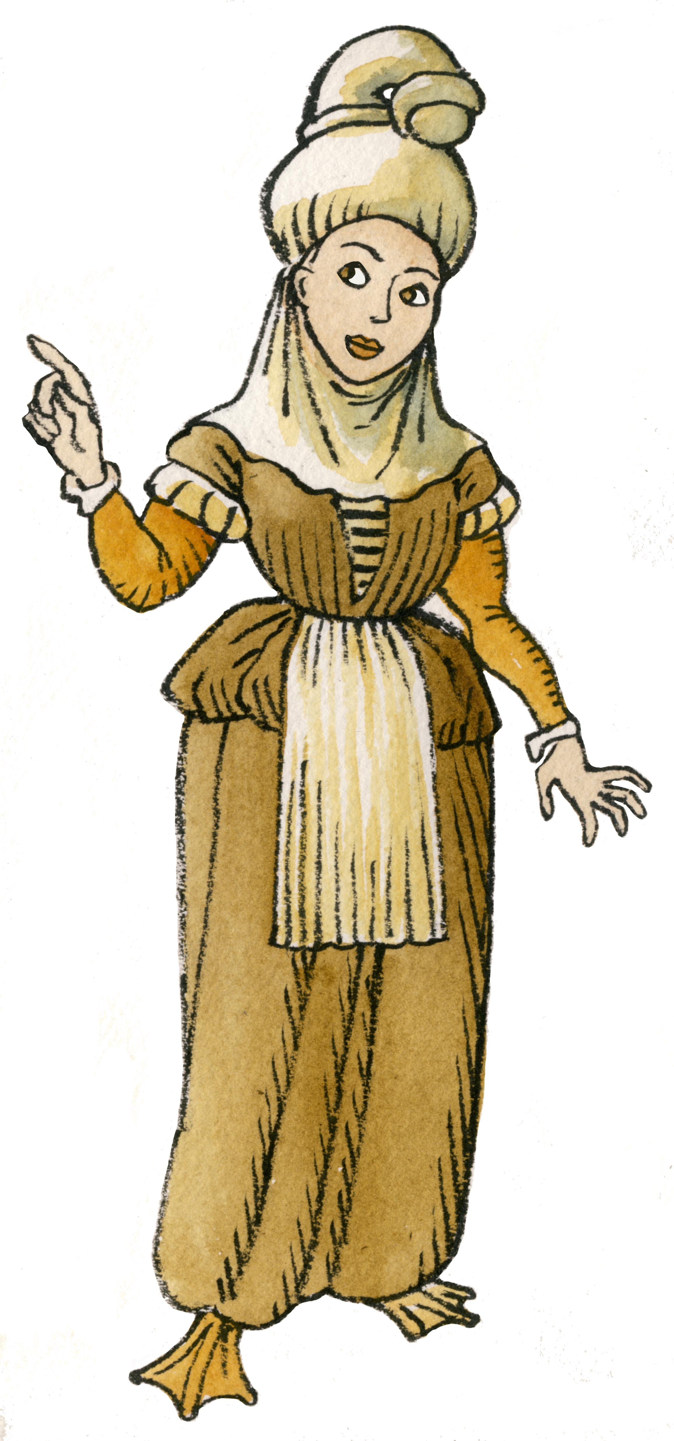 Lamina, créature de la mythologie basque. Représentation sous forme d'une femme avec des pieds d'oie. Costume d'Ascain du XVIIe siècle, coiffe "phallique" caractéristique.